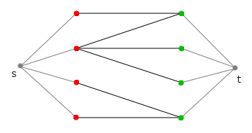 Matching im bipartiten Graphen als Schnittproblem